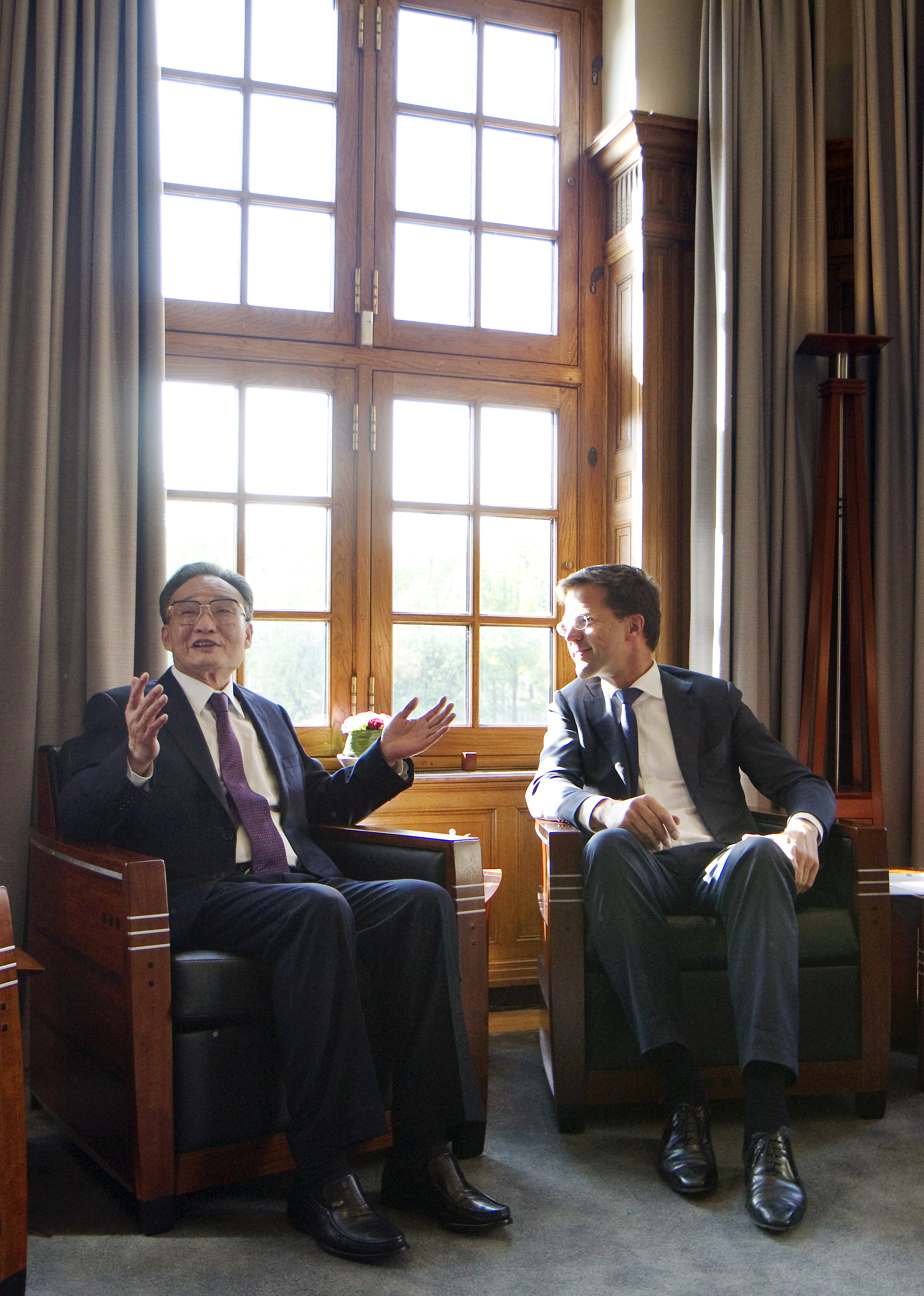 Minister-president Rutte ontvangt de heer Wu Bangguo, voorzitter van het Permanent Comité van het Nationale Volkscongres China. Bij deze ontmoeting zijn ook minister Verhagen van Economische Zaken, Landbouw en Innovatie en minister Rosenthal van Buitenlandse Zaken aanwezig. Op de agenda staan onder meer de politieke en economische betrekkingen. De voorzitter van het Permanent Comité van het Nationale Volkscongres China is in Nederland op uitnodiging van de voorzitters van de Eerste en Tweede Kamer der Staten-Generaal. Hij is uitgenodigd naar aanleiding van de 40 jaar bilaterale banden tussen Nederland en China.